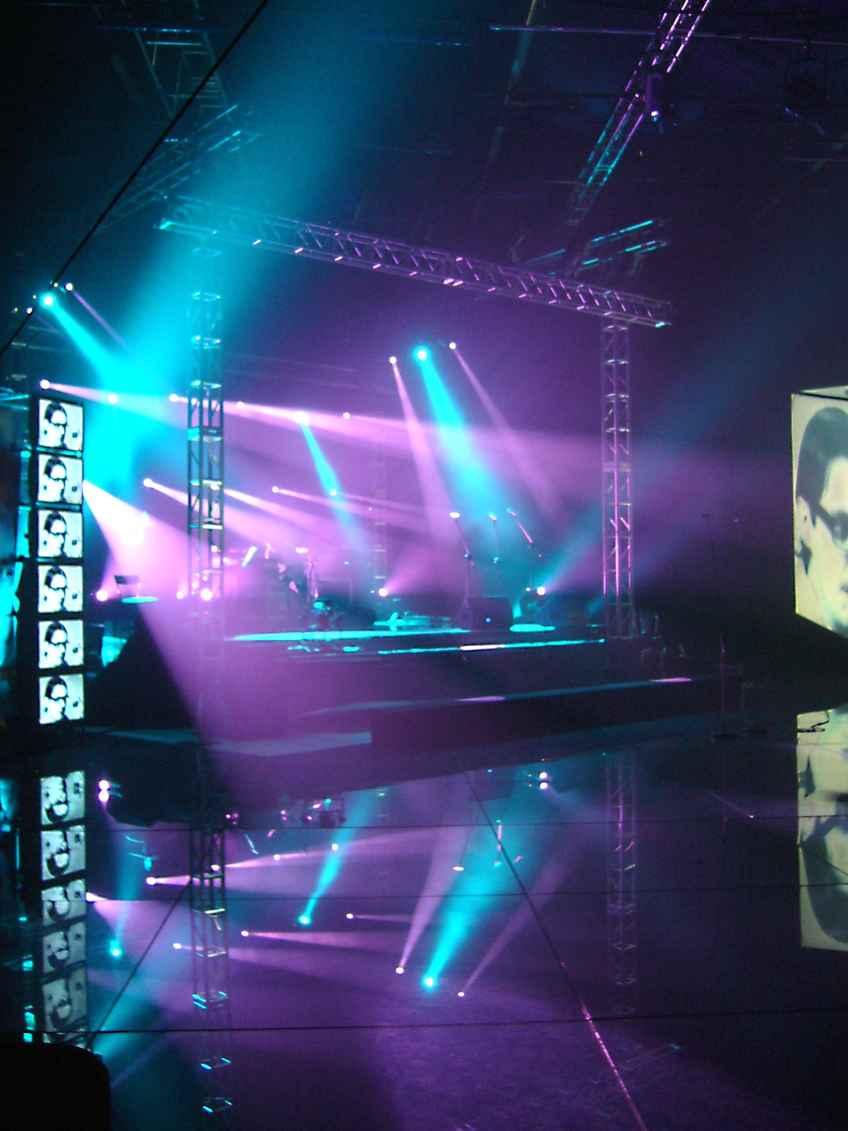 Scena Dwa Gołębie 2007 Festival. Dwa Golebie 2007 Festival's stage.